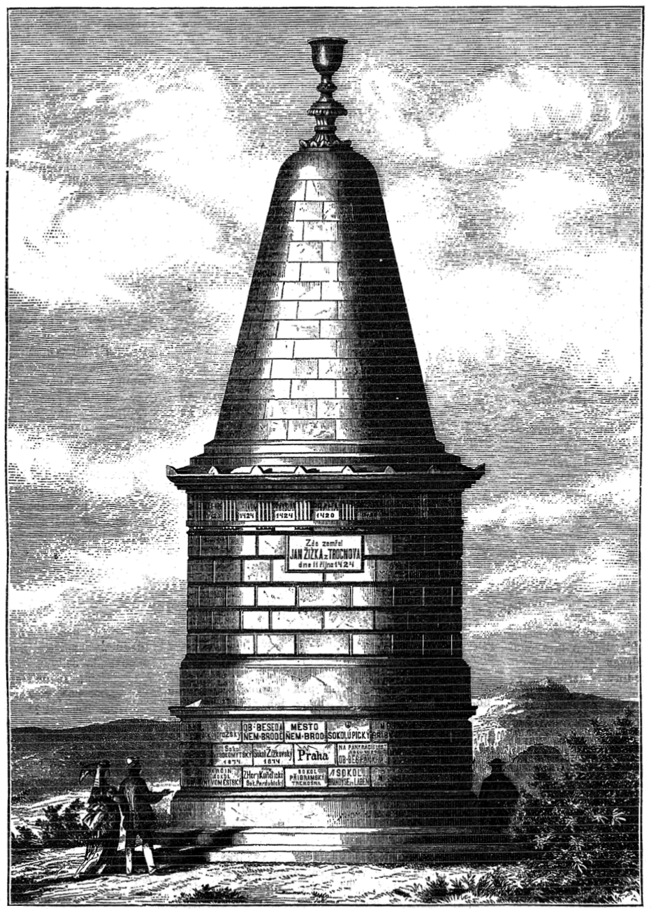 Vyobrazení Žižkova pomníku z roku 1874 v Žižkově Poli u Přibyslavi. Časopise Světozor, 1874, číslo 35, strana 418. Kreslil Fr. Chalupa.